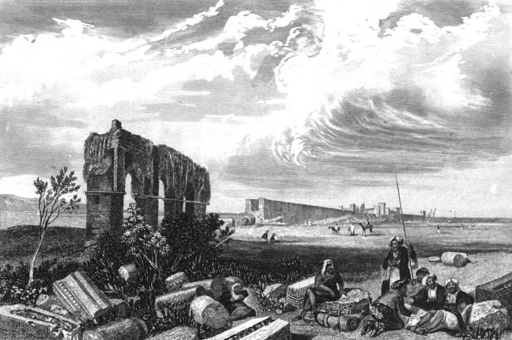 Tyre